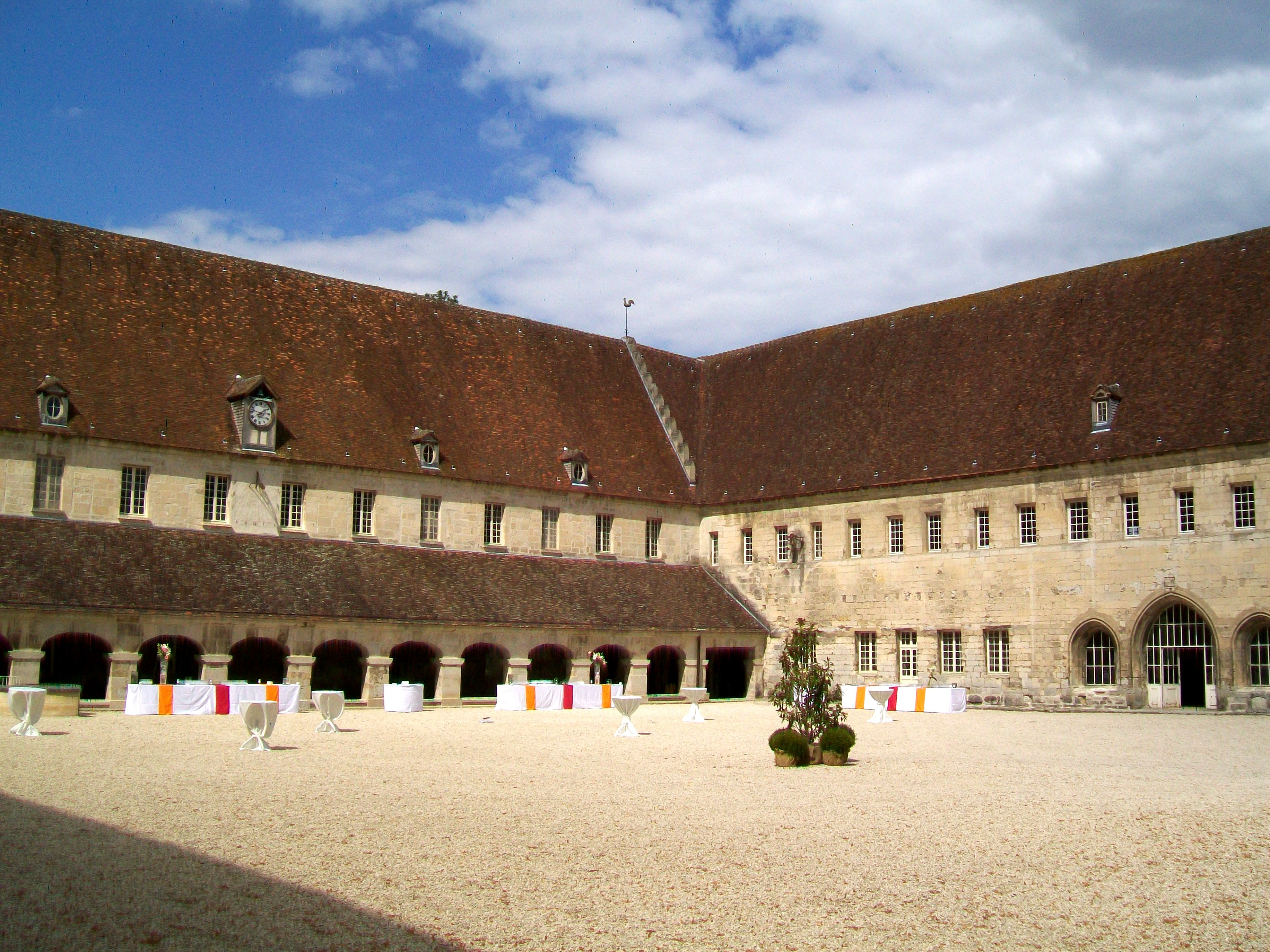 Cour de l'ancienne abbaye, autrefois cloître, qui subsiste le long de l'aile nord (à gauche). A droite, l'aile est, avec au rez-de-chaussée, la salle capitulaire et le chartrier.